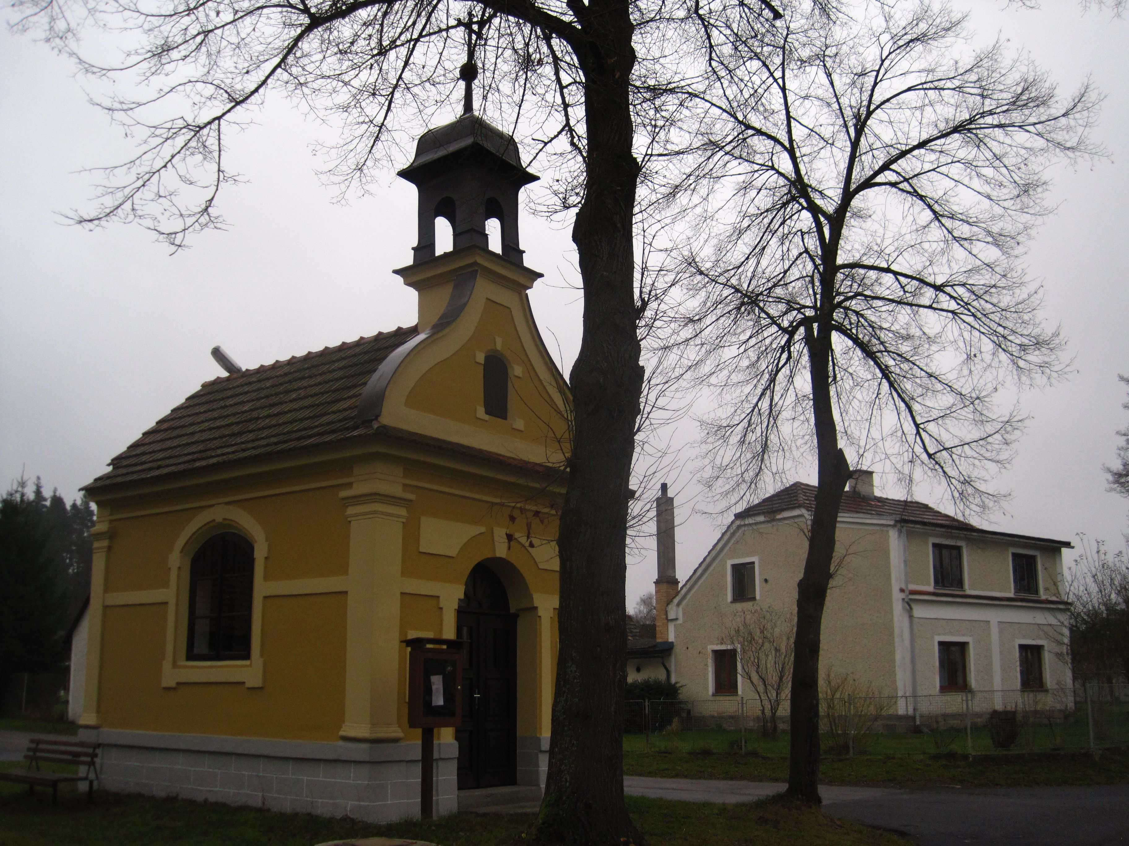 Petříkov - kaplička